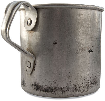 Алюминиевая кружка. Производитель: завод "Красный штамповщик", Москва, 1930-е гг.